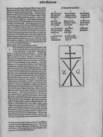 Incunable écrit par Ibn Zuhr, ʿAbd al-Malik ibn Abī al-ʿAlāʾ Zuhr ibn ʿAbd al-Malik Abū Marwān (1092?-1162) ; traduit par Jacobus Hebraeus et imprimé par Jean et Grégoire de Forlivio en 1490 à Venise. Le colophon en bas à gauche est complété par la marque d'imprimeur des deux frères au milieu à droite.